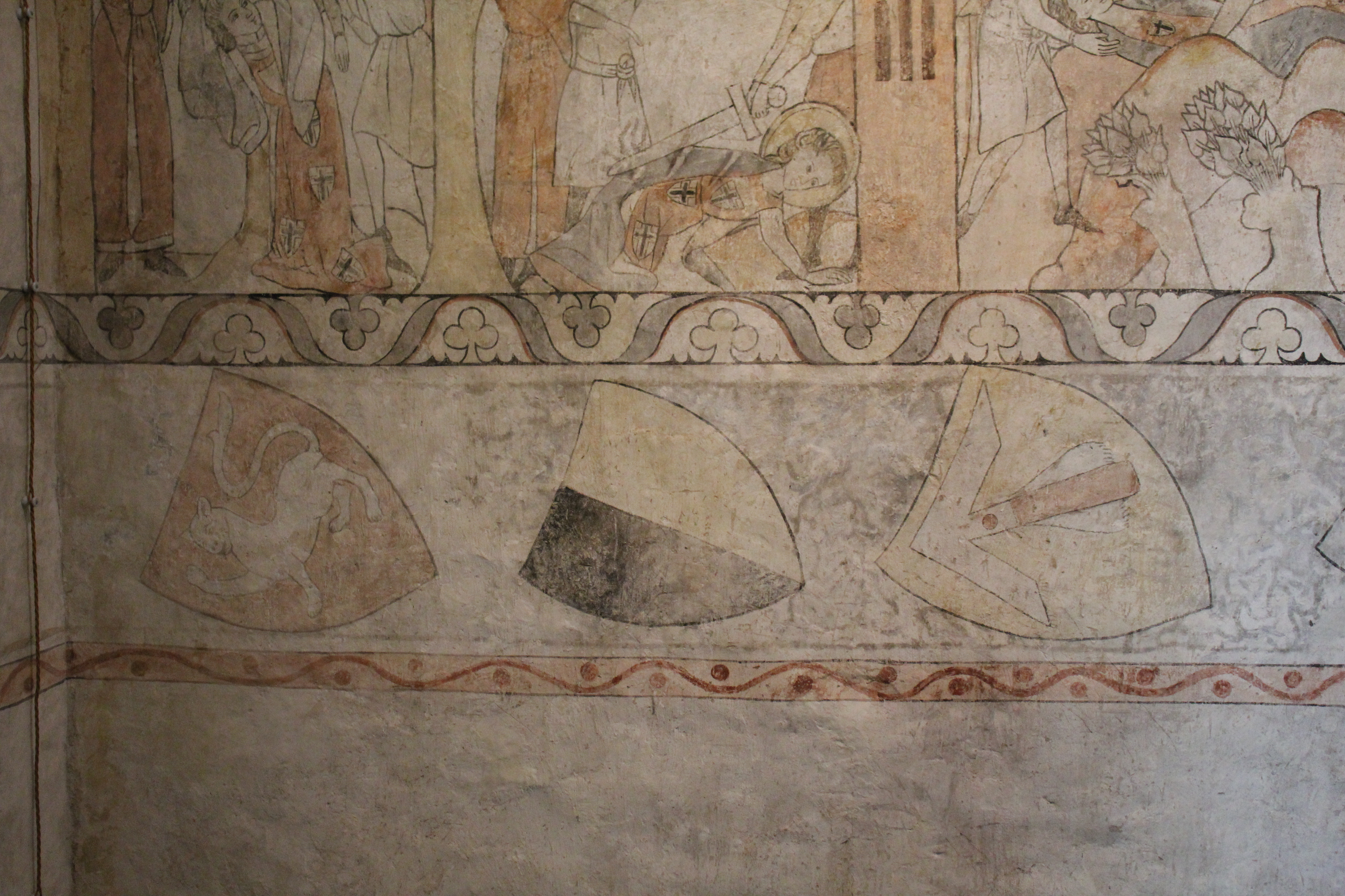 Sál se svatojiřskou legendou, dolní pás s erbovní galerií.